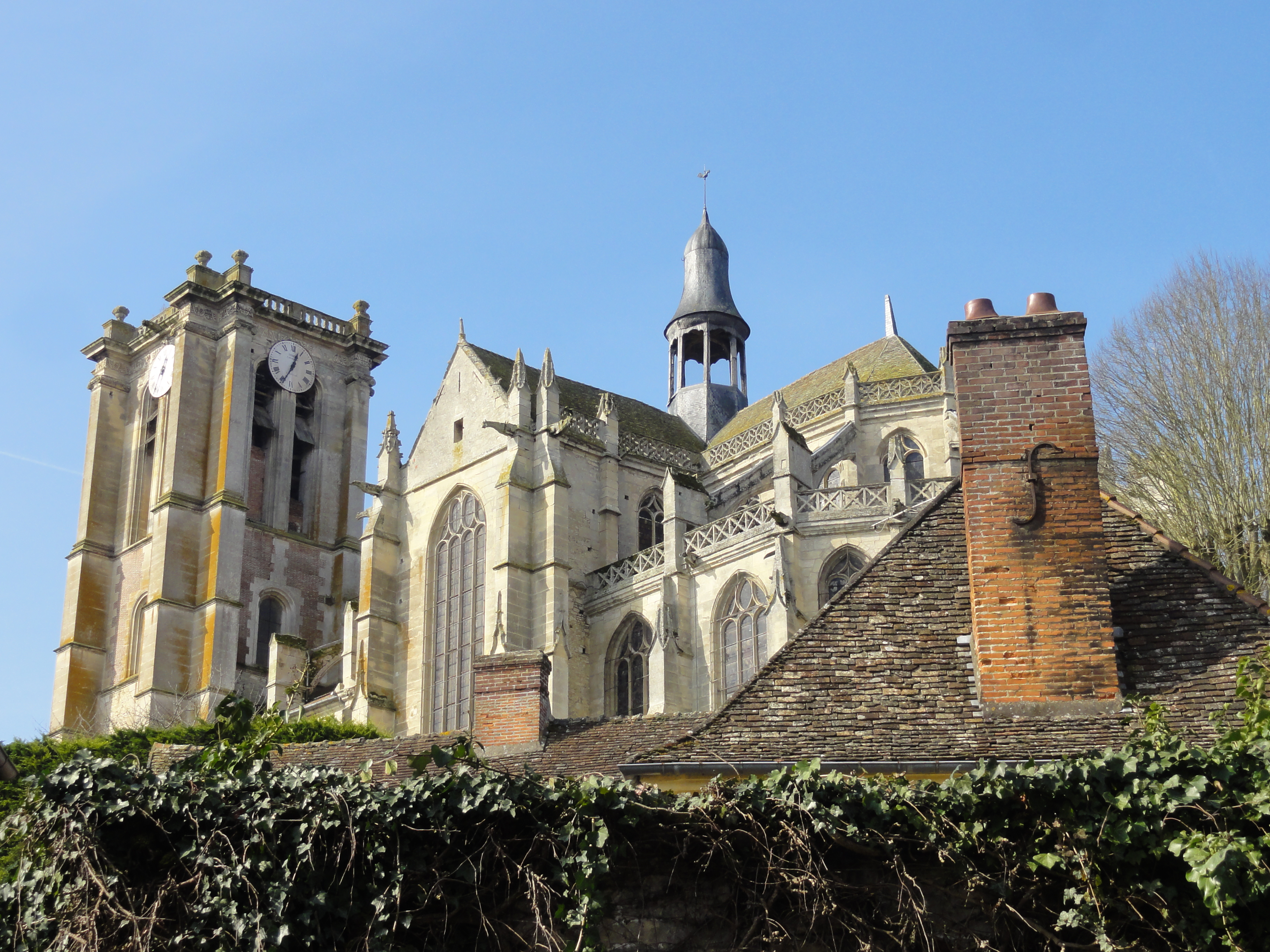 Église Saint-Jean-Baptiste de Chaumont-en-Vexin - voir titre.